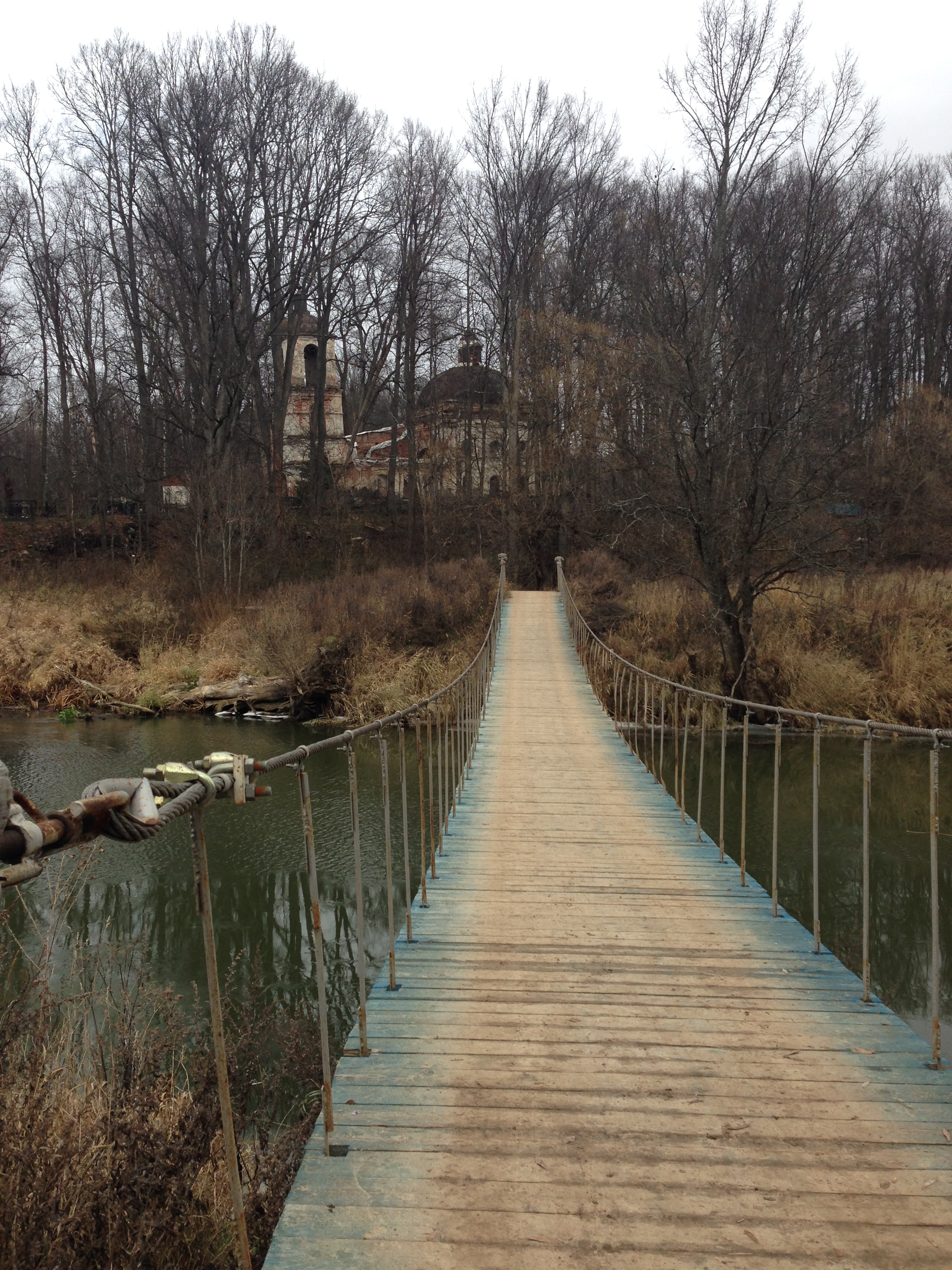 Пешеходный подвесной мост к деревне Троица-Вязники.